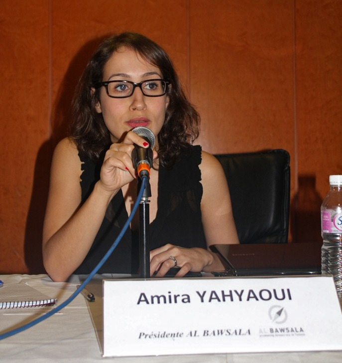 Al Bawsala President Amira Yahyaoui says her group aims to "promote transparency and citizen participation in political affairs". رئيسة منظمة البوصلة أميرة اليحياوي تقول إن مجموعتها تسعى إلى "تعزيز الشفافية ومشاركة المواطن في الشأن السياسي". La présidente d'Al Bawsala, Amira Yahyaoui, explique que son association vise à "promouvoir la transparence et la participation des citoyens dans les affaires politiques".